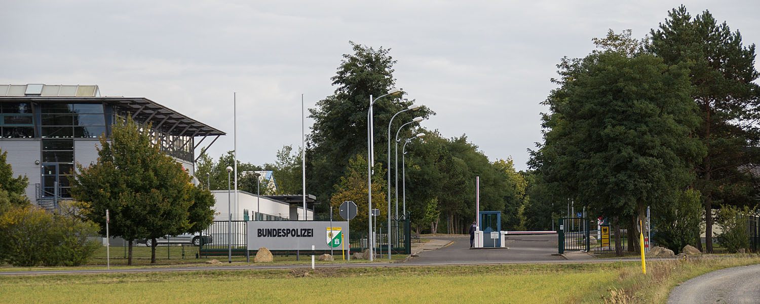 Bundespolizei Bad Düben, Eingangsbereich mit Sporthalle links (2017)